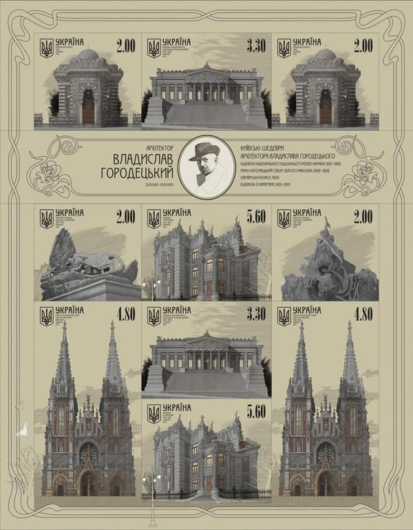 Малий аркуш марок «Архітектор Владислав Городецький»